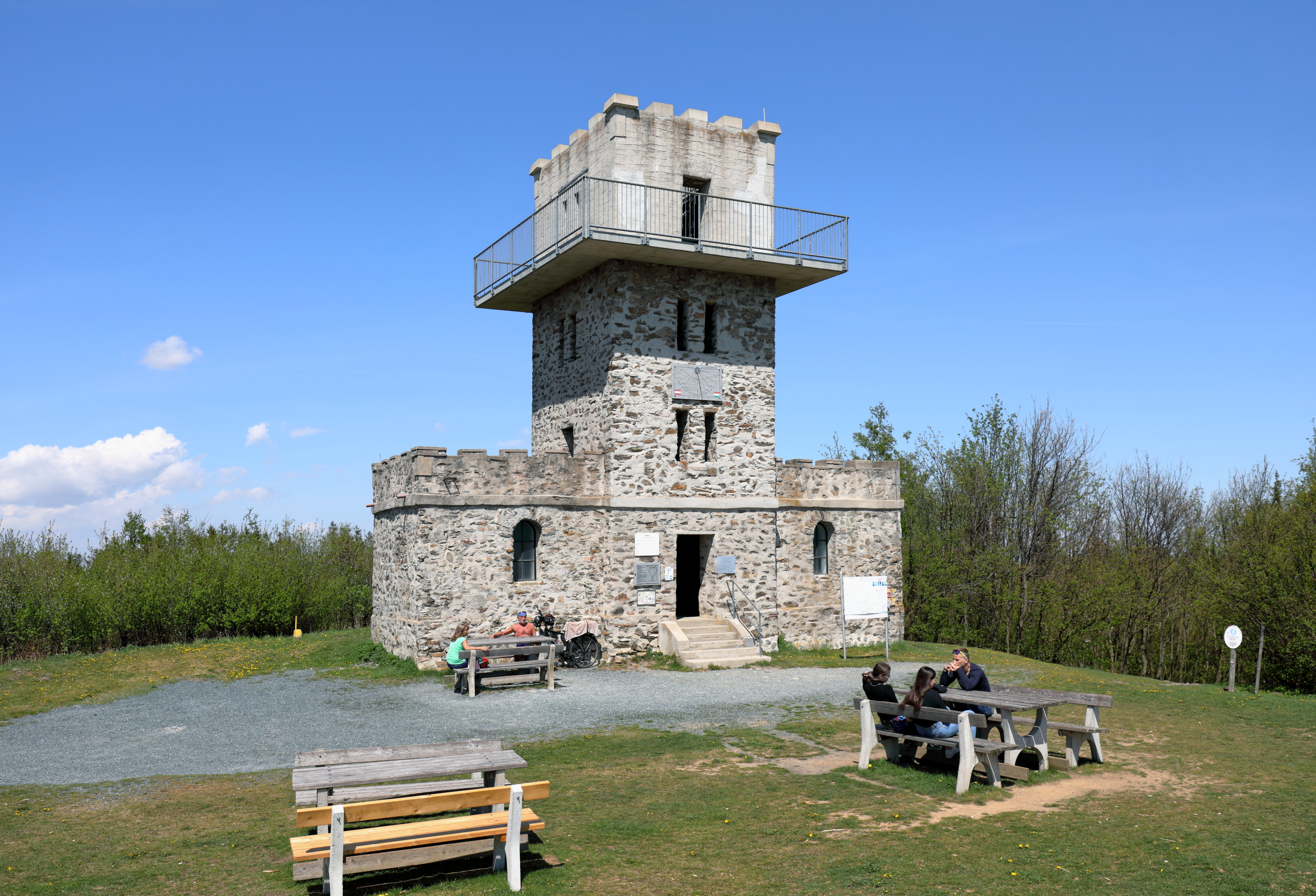 Südansicht der Aussichtswarte am Gipfel des 884 m hohen Geschriebensteins, der der höchste Berg des Burgenlandes und von Westungarn ist. Der Mittelpunkt der Warte befindet sich genau am Schnittpunkt der Gemeindegrenzen der österreichischen Gemeinden Lockehaus (links im Hintergrund) und Rechnitz (Vordergrund), sowie der ungarischen Gemeinde Bozsok, Kreis Kőszeg (rechts im Hintergrund). Die Aussichtswarte wurde anstelle eines 1891 errichteten Holzturms („Arpád Turm“) 1913 von der Gemeinde Rechnitz erbaut. Initiator war der Steuernotar Ladislaus Gullner und als Baumeister fungierte der Rechnitzer Josef Varga.